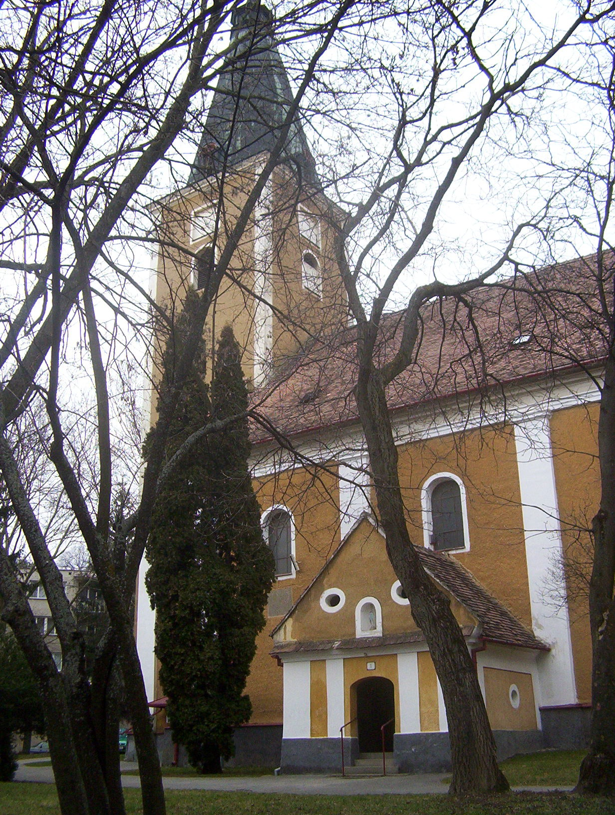 Rímskokatolícky kostol v Myjave vybudovaný v roku 1711 evanjelikmi, no neskôr bol odobraný v prospech rímskokatolíckej cirkvi. Dnes jeden z troch Myjavských kostolov.